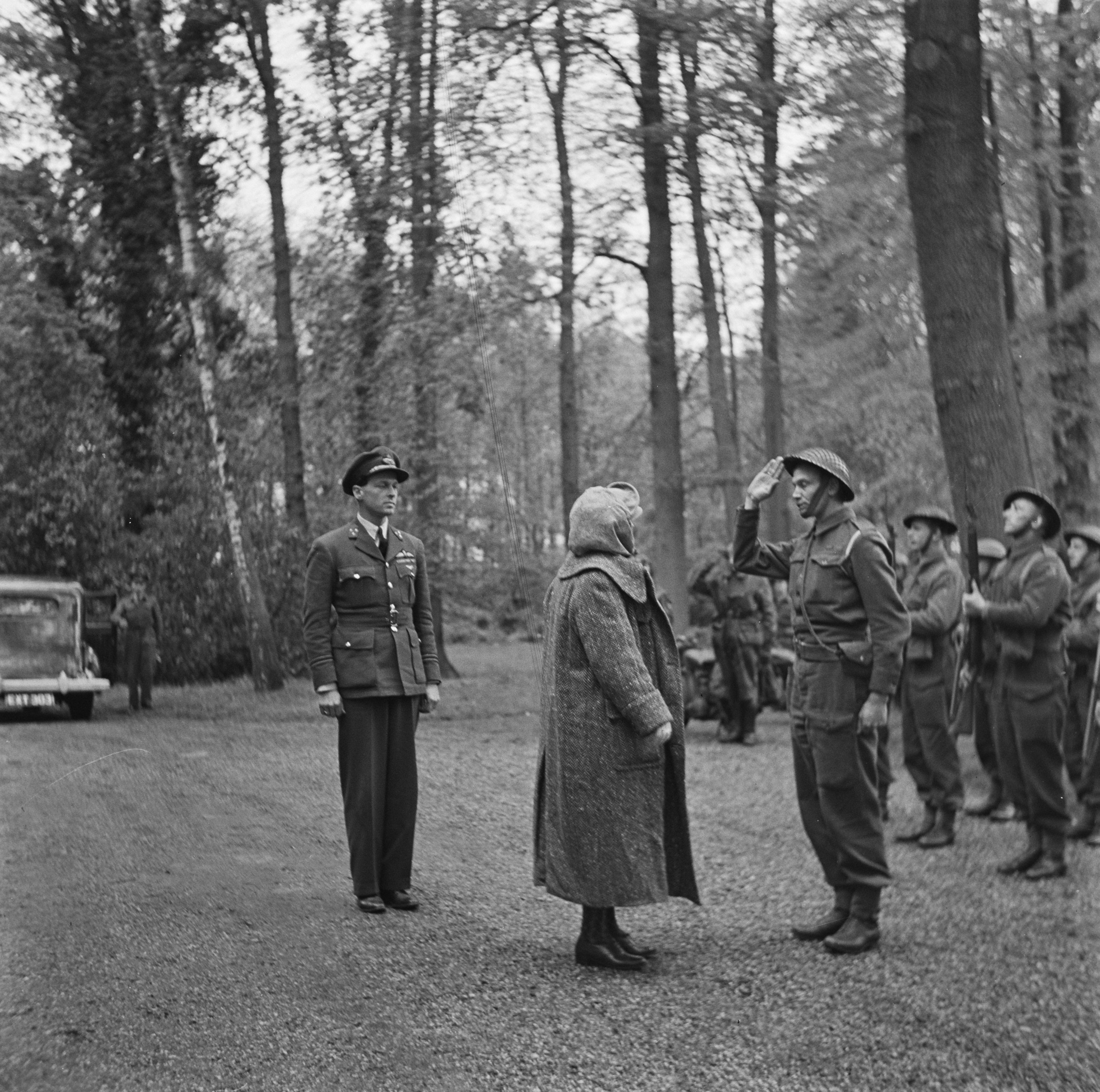 Bezoek van koningin Wilhelmina en prinses Juliana aan Breda. Inspectie van de erewacht bij villa 'Anneville' in Ulvenhout (Noord-Brabant), het tijdelijk verblijf van de koningin. Achter de vorstin haar adjudant E. Hazelhoff Roelfzema. 2 mei 1945